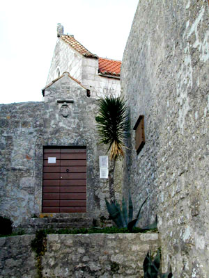 Cokovac